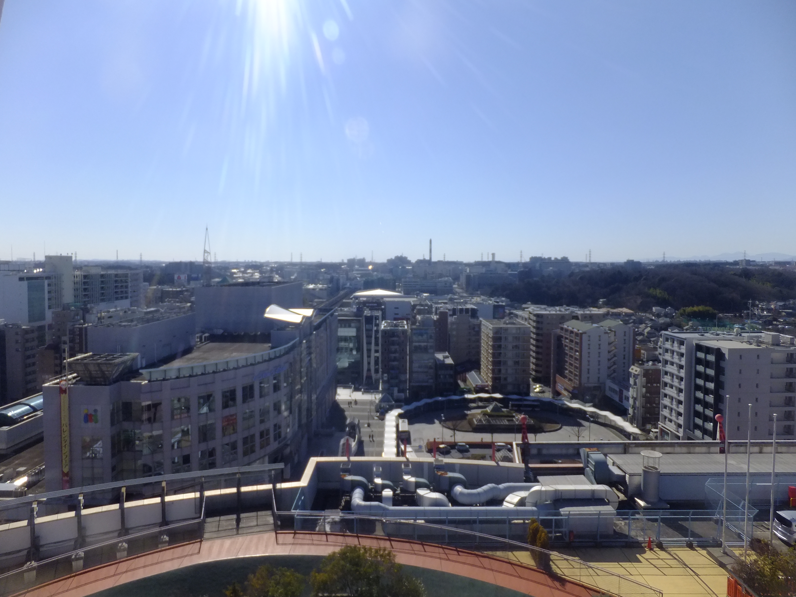 モザイクモール港北、観覧車からの眺め（センター北駅方向）